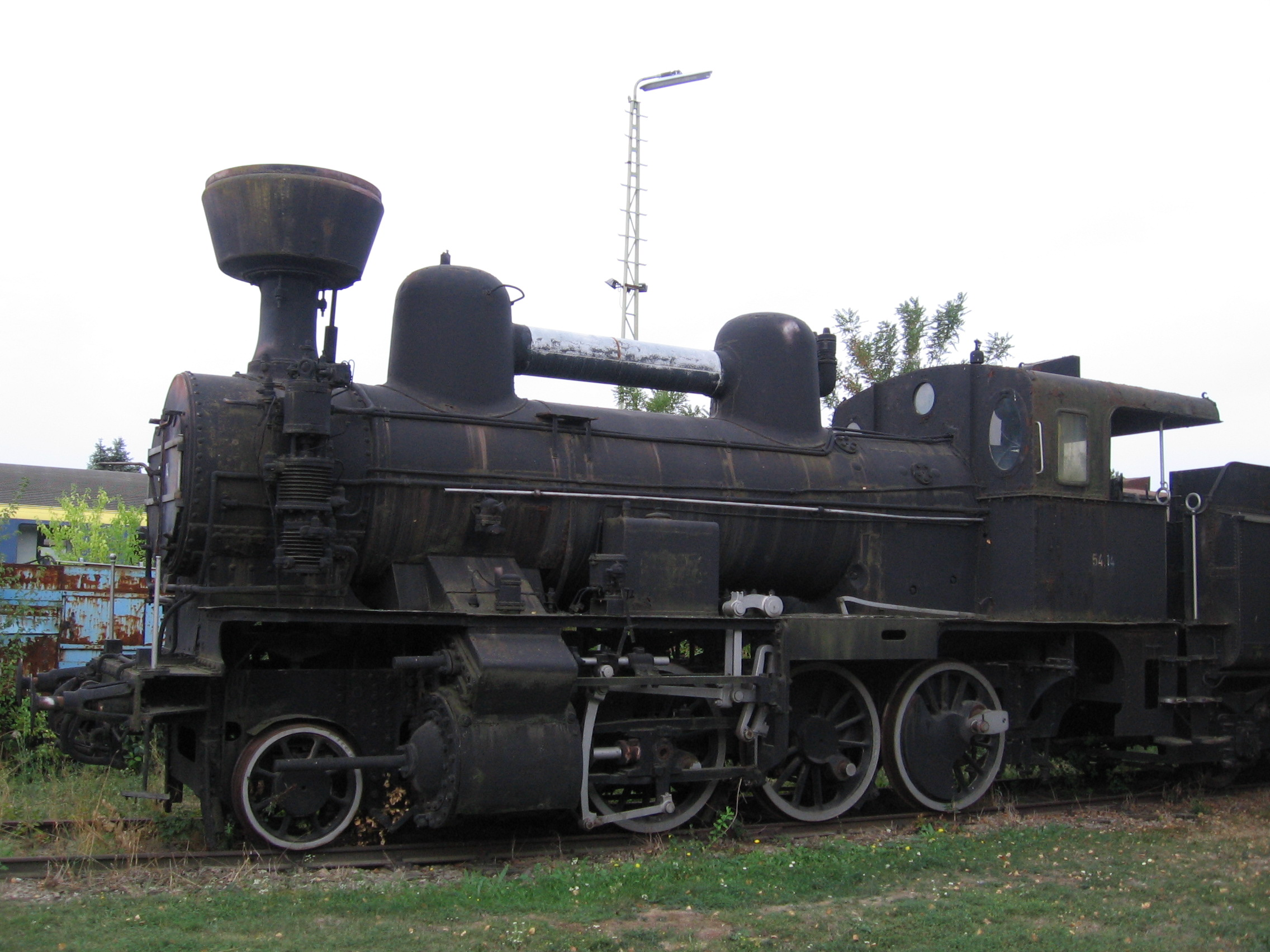 60.115 kkStB - Wiener Neustadt 4221/1899, nyní 54.14 ÖBB v železničním muzeu ve Strasshofu.